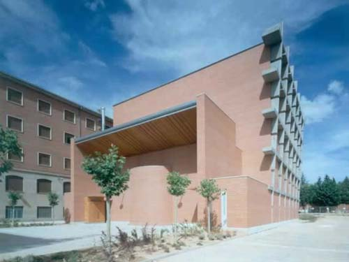 Parroquia de S. Juan de Mata, en Salamanca, 1998